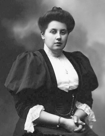 Анна Вырубова